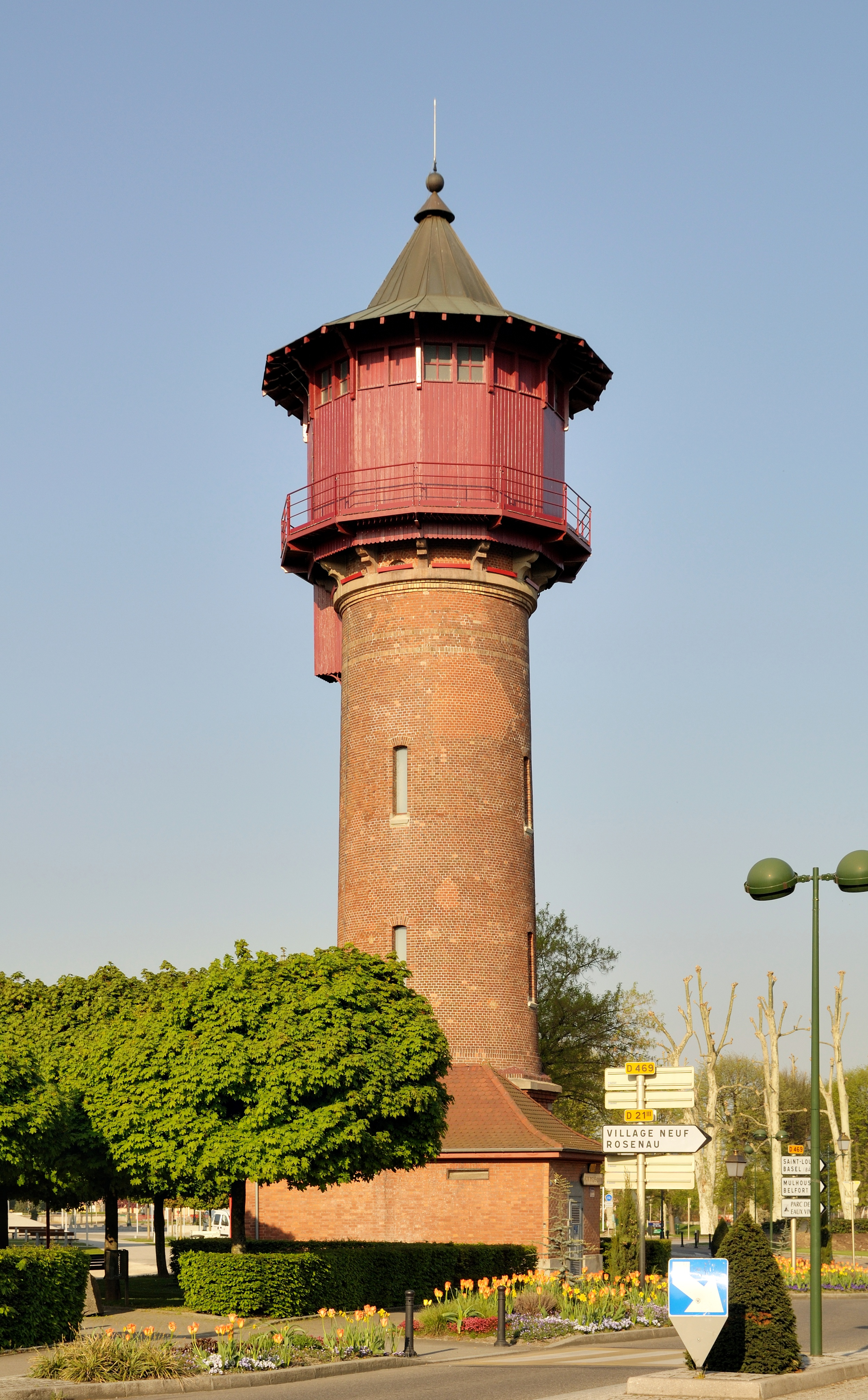 Huningue: Château d’eau